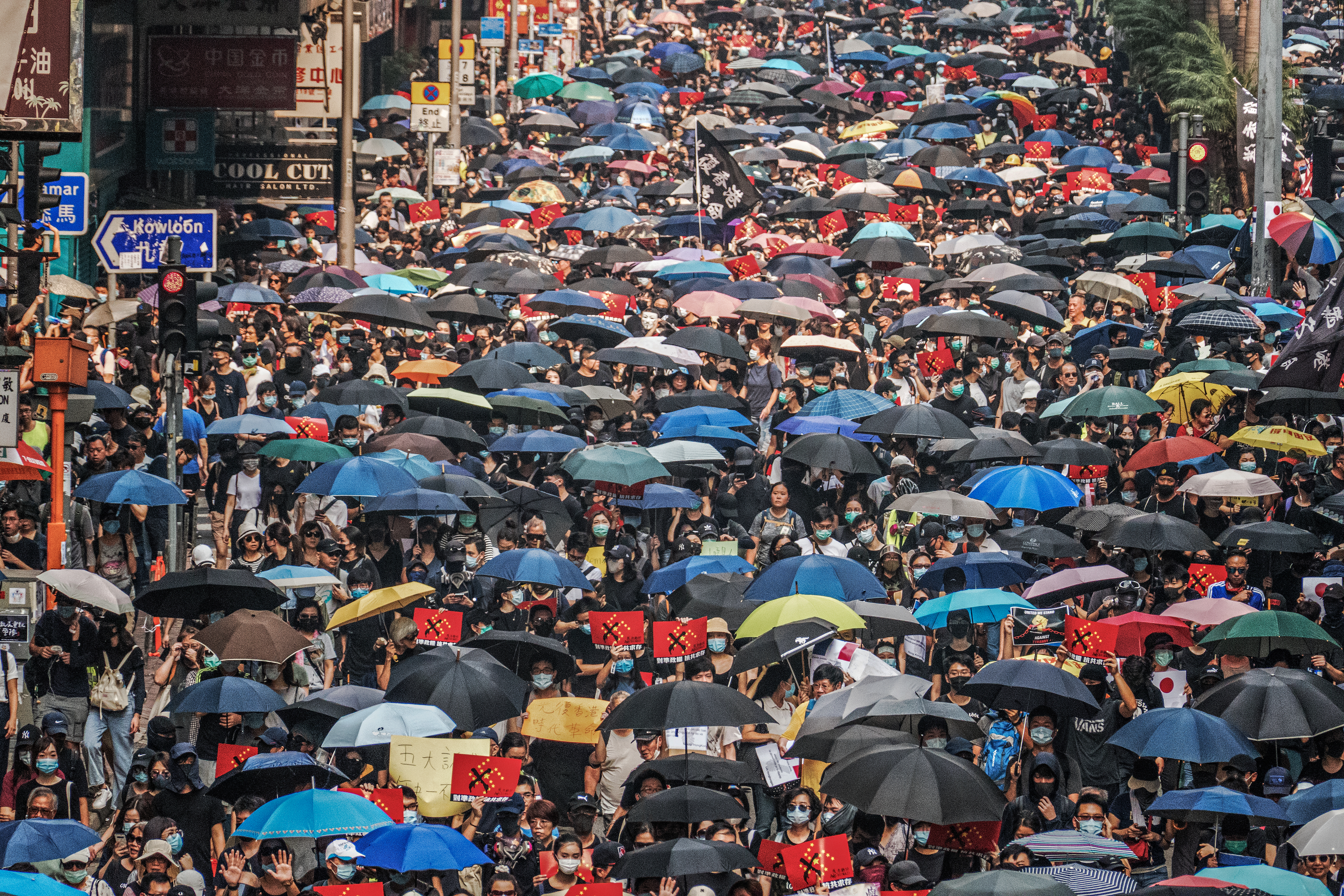 2019-09-29 全球反極權大遊行 Anti-totalitarianism rally (Hong Kong)